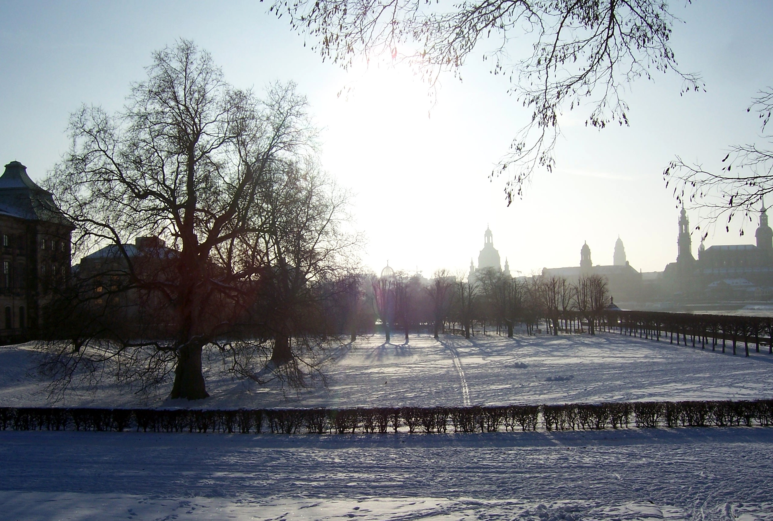 Der Palaisgarten in Dresden mit zwei gepflanzten Platanen aus dem Jahr 1770 bzw. 1780. Im Hintergrund ist die Dresdner Frauenkirche erkennbar.